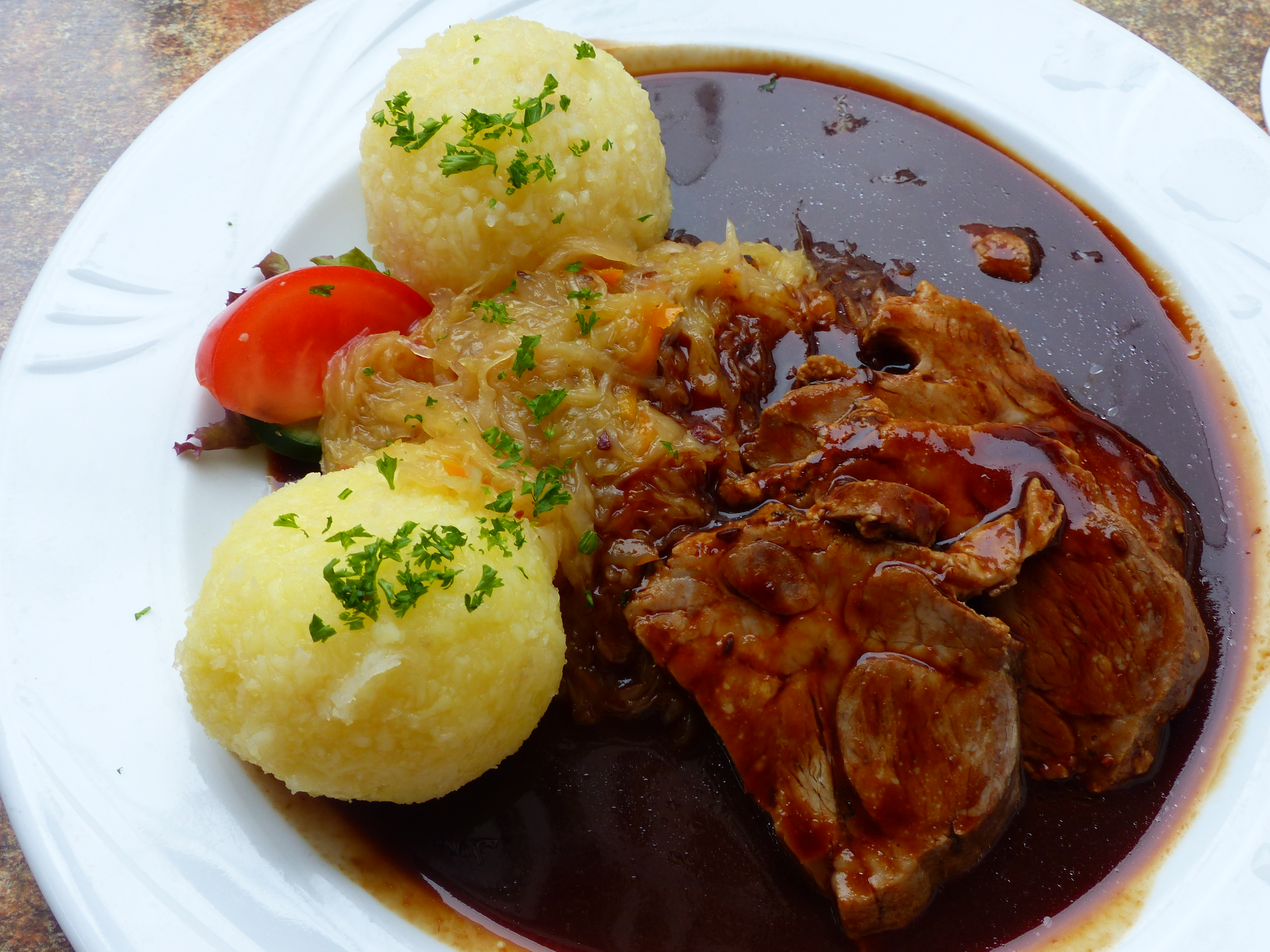 Köstritzer Schwarzbierbraten mit Thüringer Klößen, Köstritzer Schwarzbierhaus, Weimar